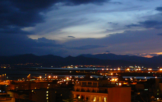 Capoterra vista da Cagliari - zona Buon Cammino